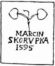 Daus gruen, Polen 1595